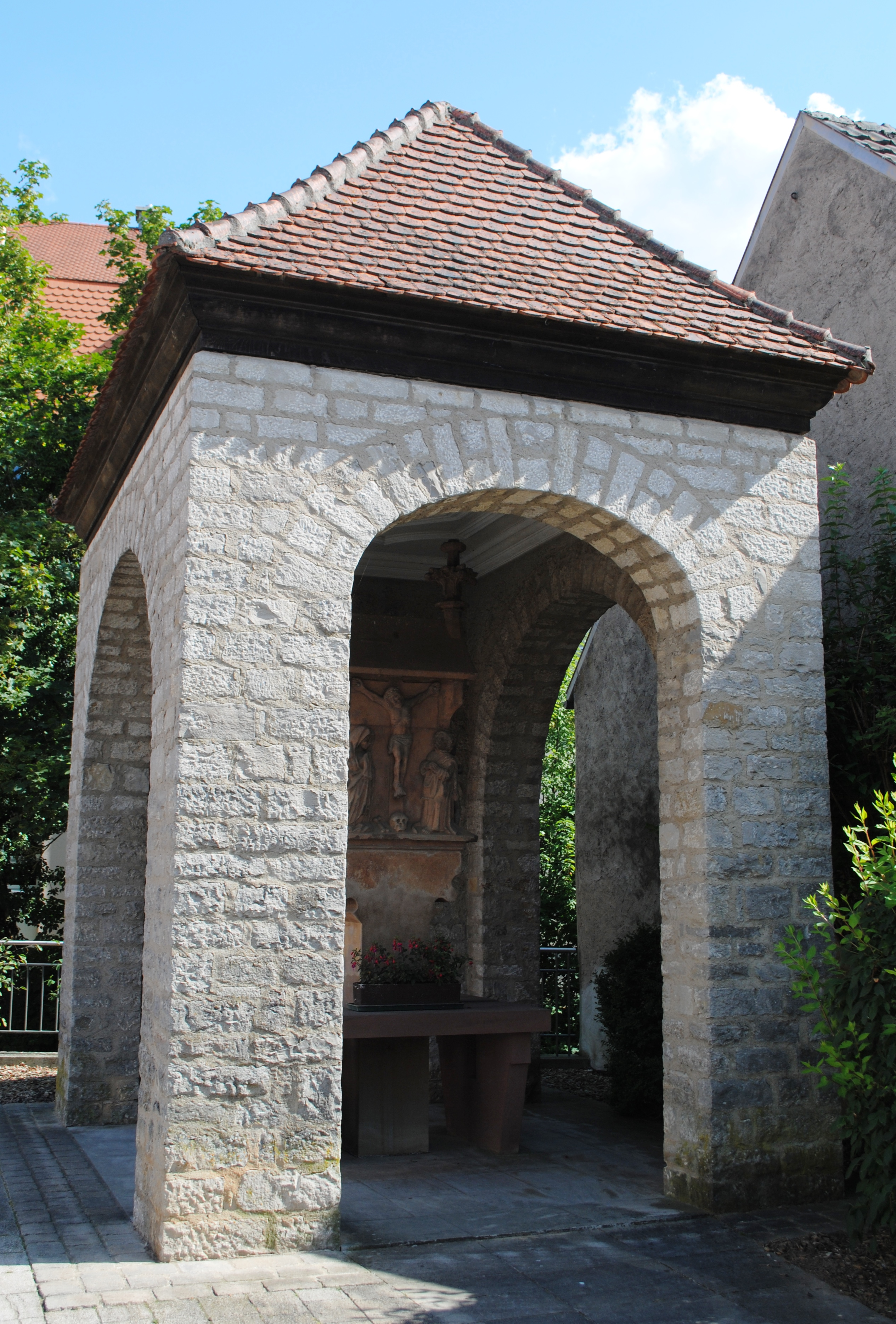 Kapellenüberbau, Kreuzigungsbildstock, Josef-Wächter-Straße, Volkach